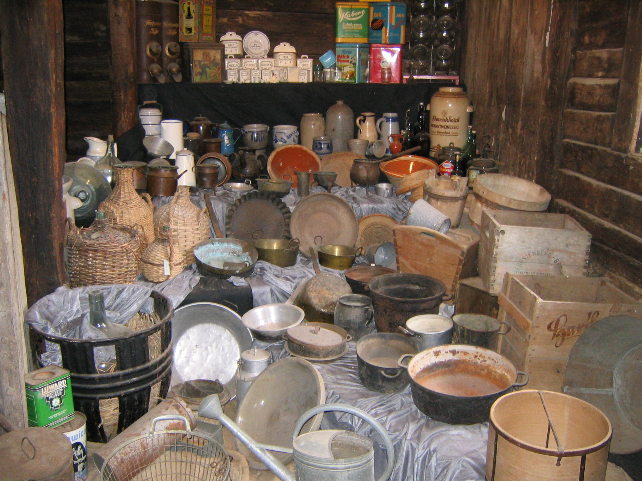 Allerlei Gefäße im Freilichtmuseum Neuhausen ob Eck.